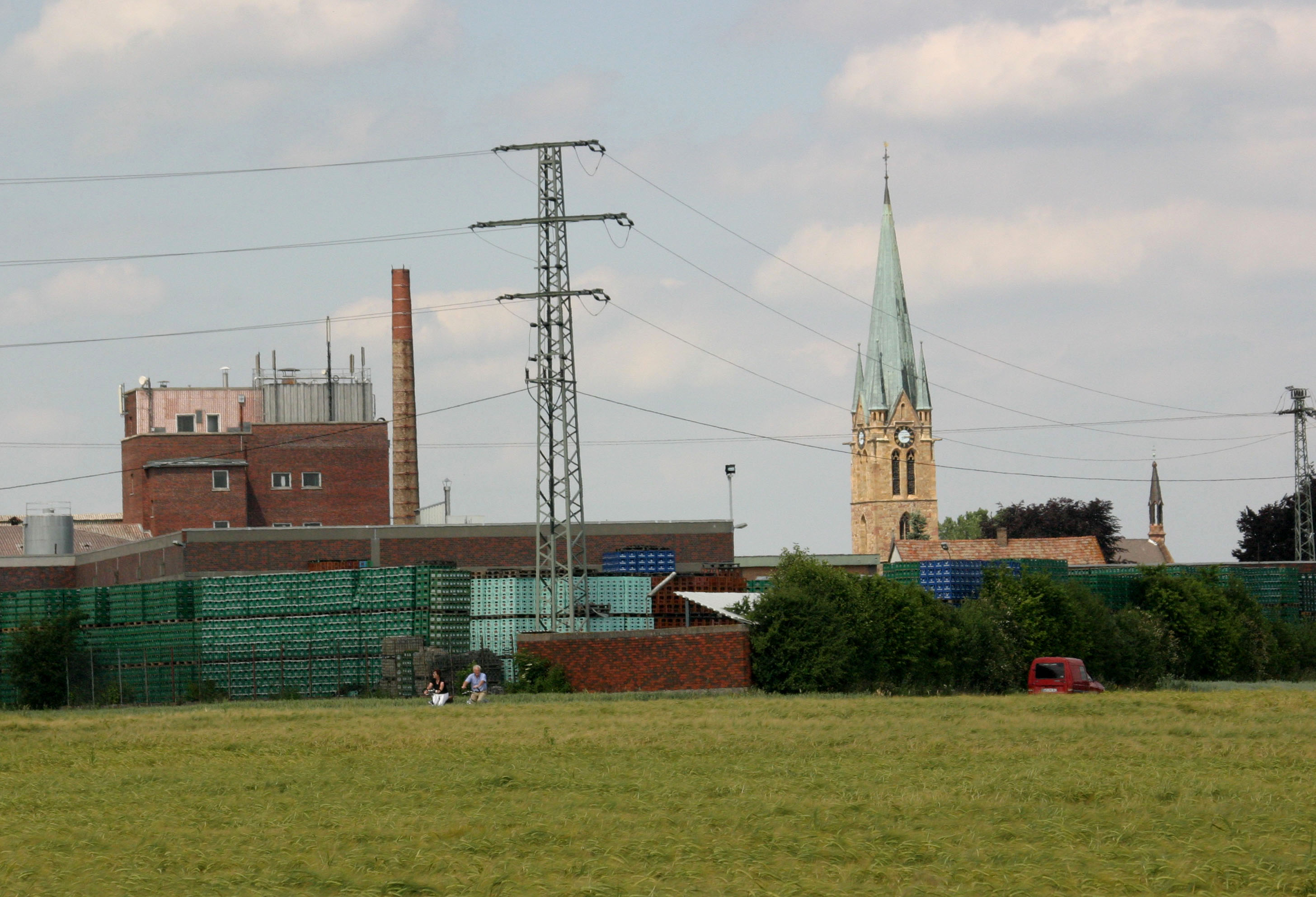 Bellheim; Brauerei Silbernagel. Katholische Pfarrkirche St. Nikolaus, Hauptstraße 100; spätgotischer Turm, 1482, neugotische Hallenkirche, 1867–73; neugotischer Sandsteinkruzifix.